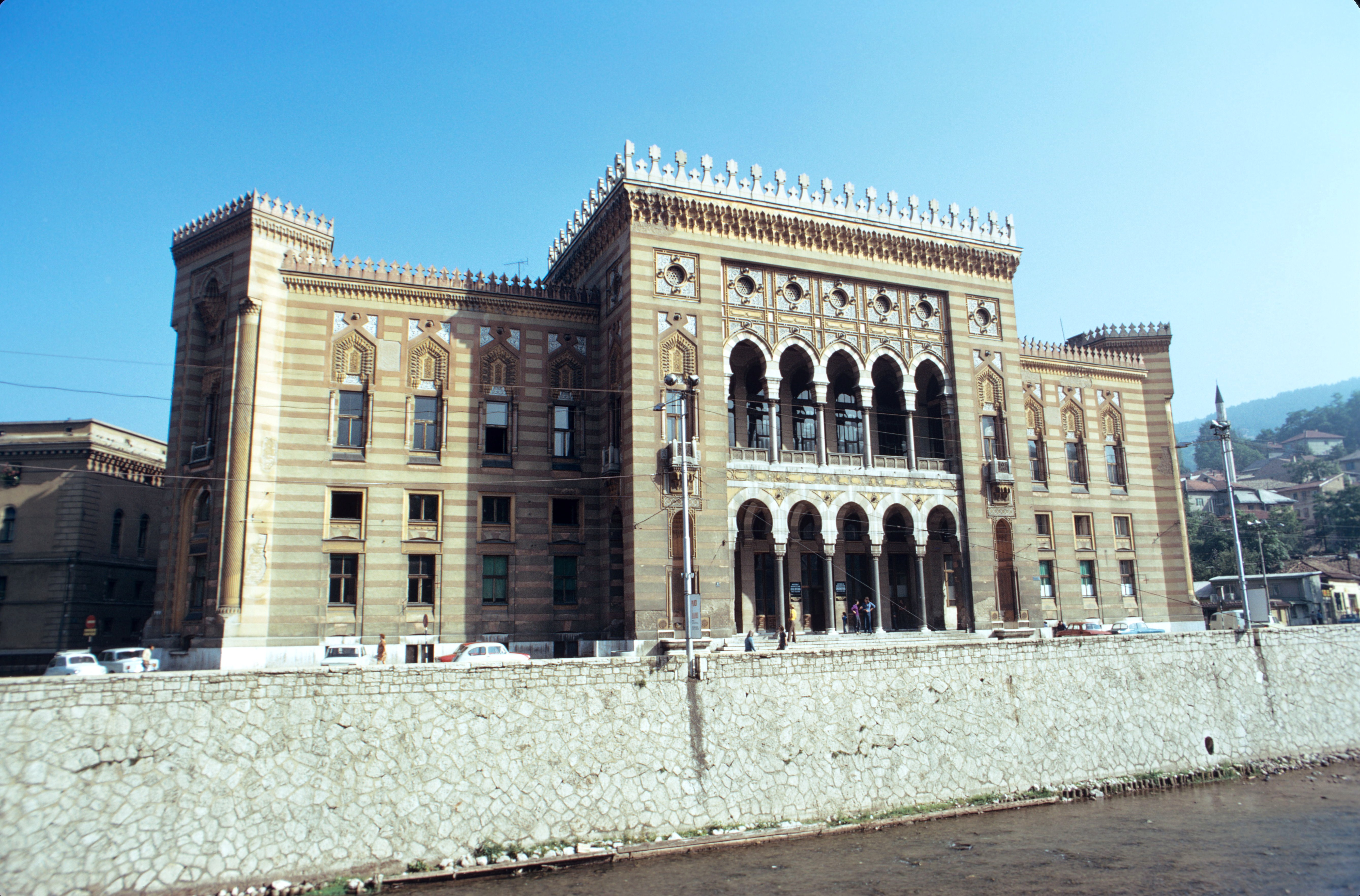 La Bibliothèque Nationale et Universitaire de Bosnie-Herzégovine à Sarajevo. En 1946, la Bibliothèque Nationale et Universitaire de Bosnie-Herzégovine a été installée dans ce bâtiment de style hispano-mauresque qui, auparavant, accueillait l' Hôtel de Ville de Sarajevo. Pendant la guerre de Bosnie-Herzégovine, la Bibliothèque a été intentionnellement bombardée en août 1992 par les forces des Serbes de Bosnie. Les collections ont été détruites à plus de 80%. Sarajevo, Bosnie-Herzégovine (Yougoslavie en 1974).